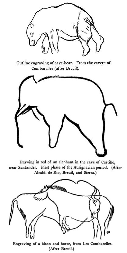 Cave illustrations